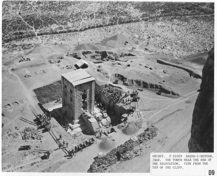 بنای کعبه‌ی زرتشت